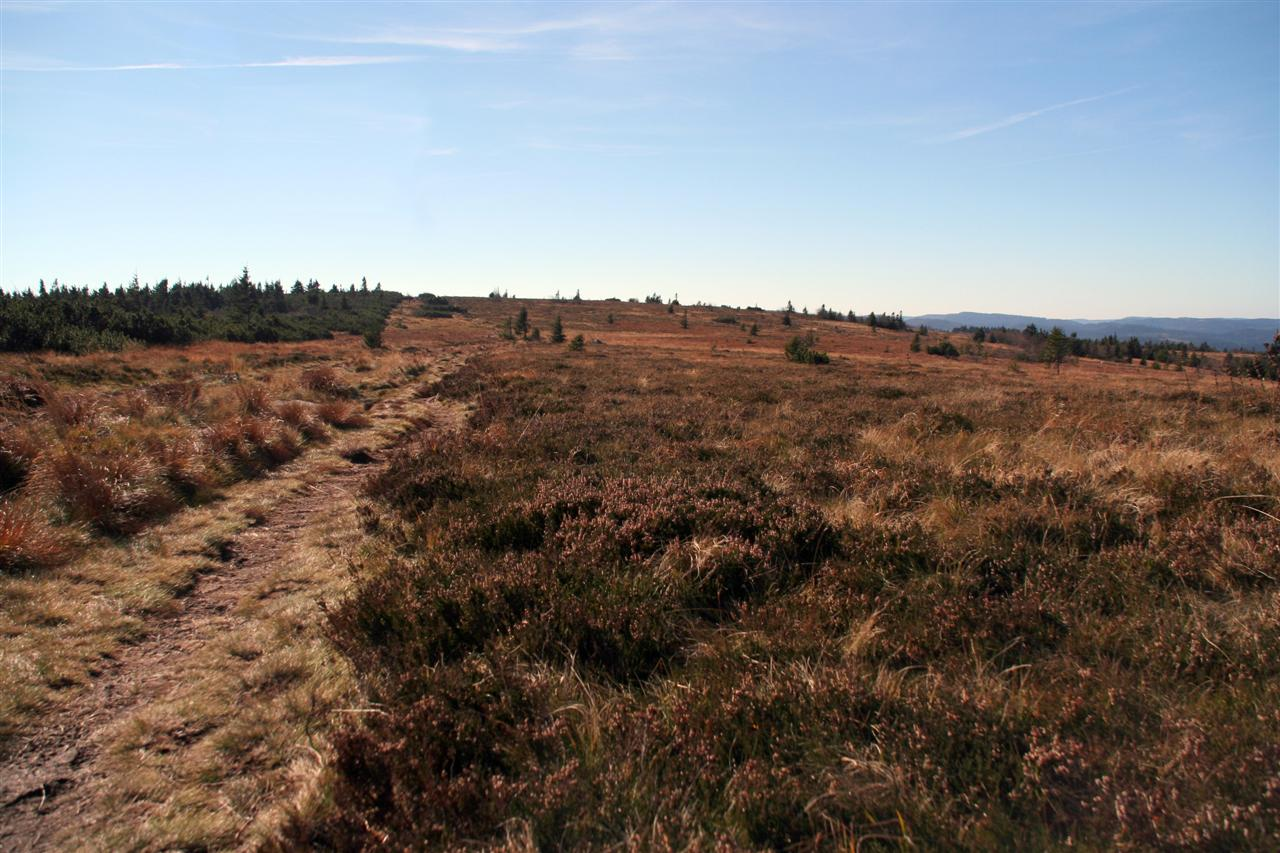 Hautes chaumes au gazon du Faing, massif des Vosges, Alsace, France.